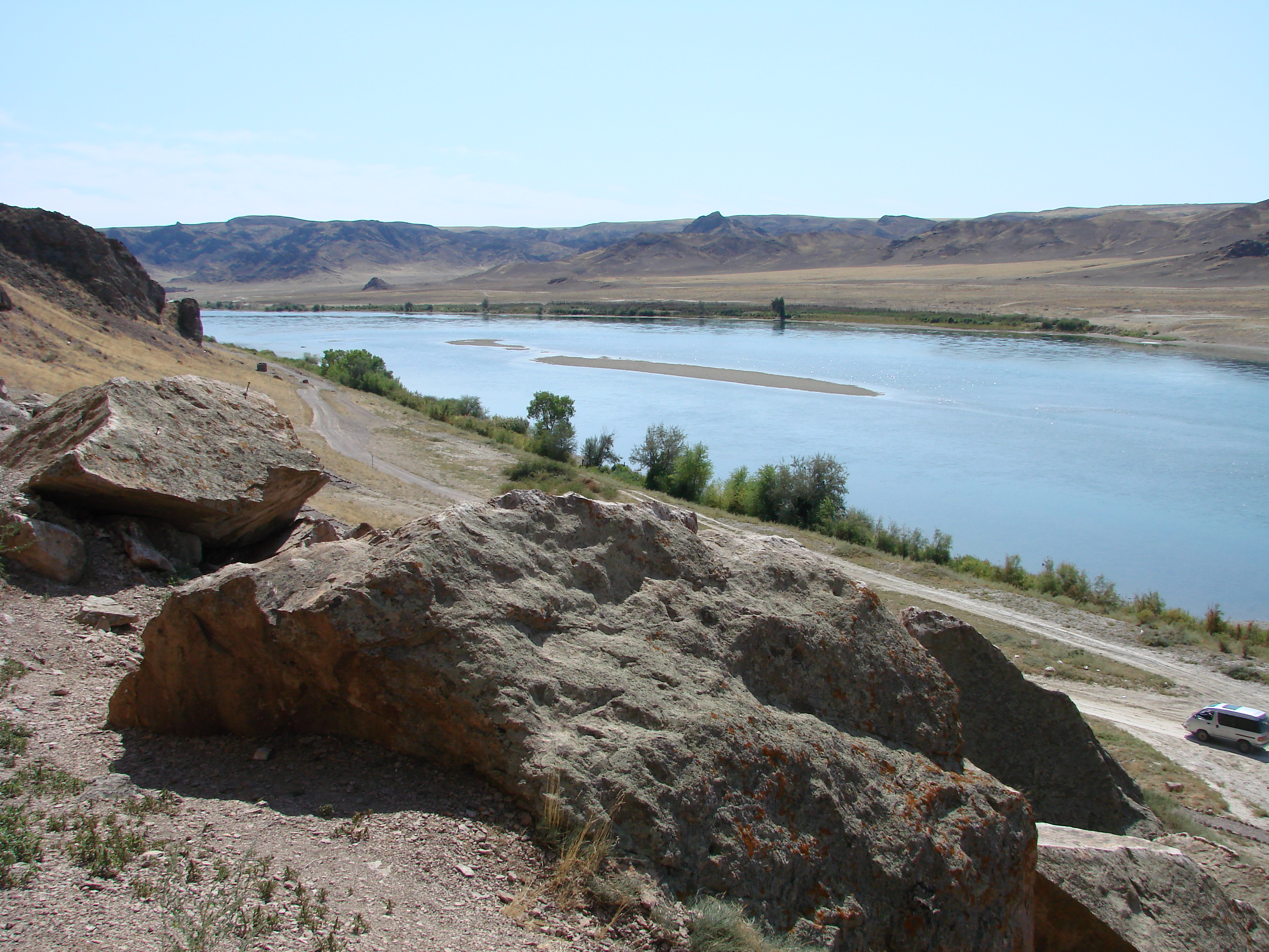 Река - "Или", Казахстан, Алма-Атинская область.